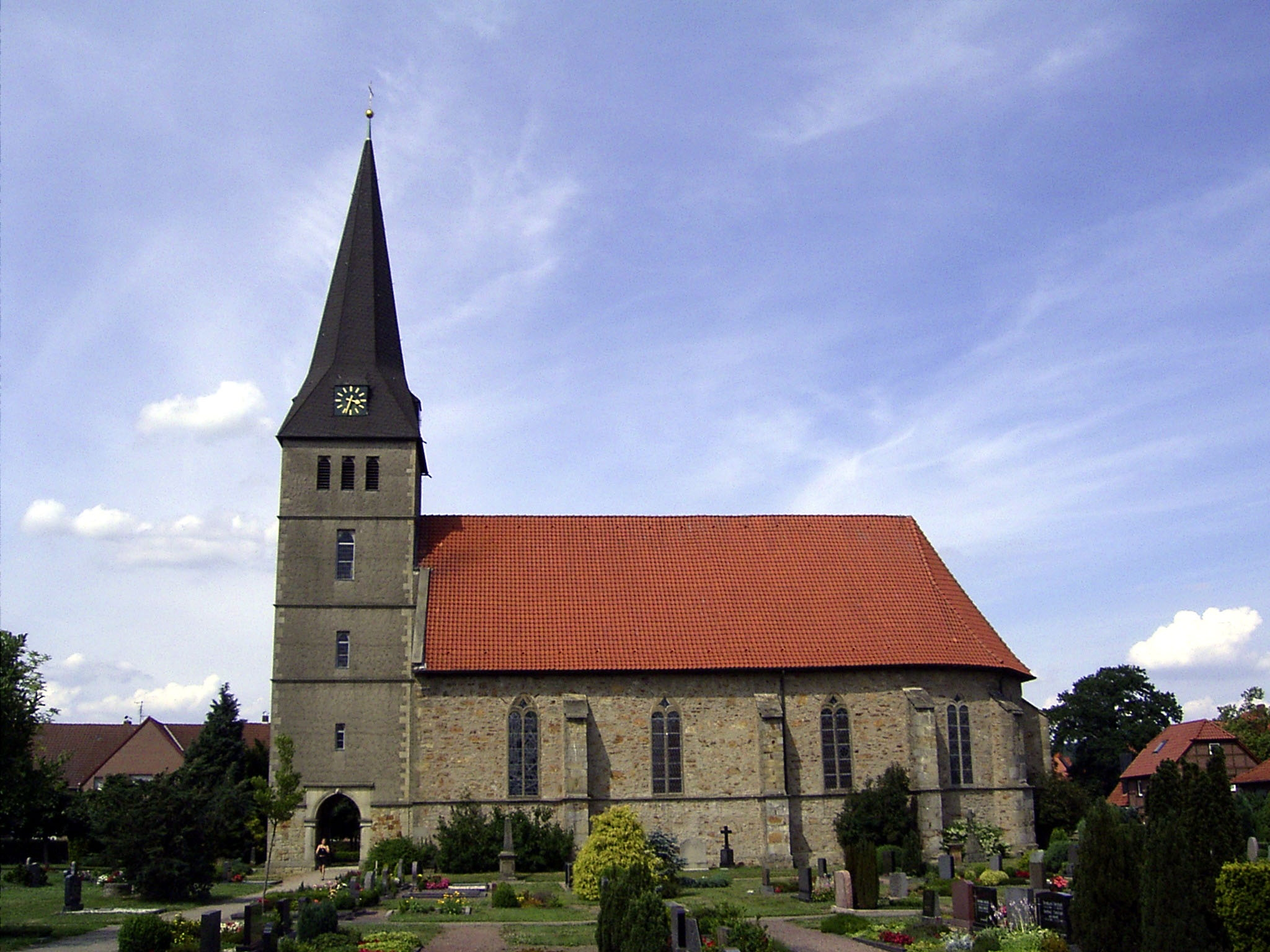 Die evang.-luth. Kirche in Sachsenhagen, Landkreis Schaumburg, Niedersachsen